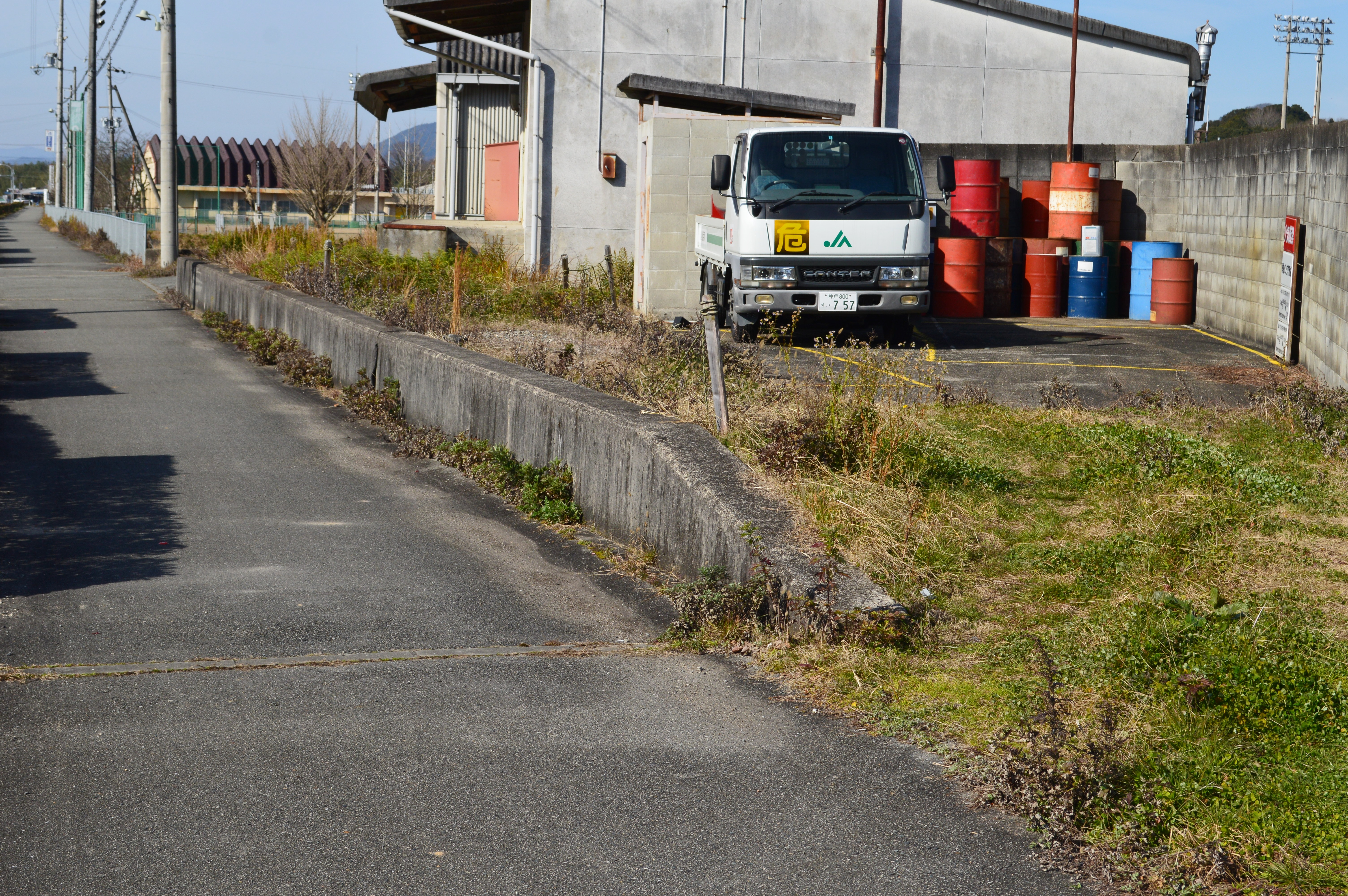 篠山線 丹波日置駅 ホーム跡